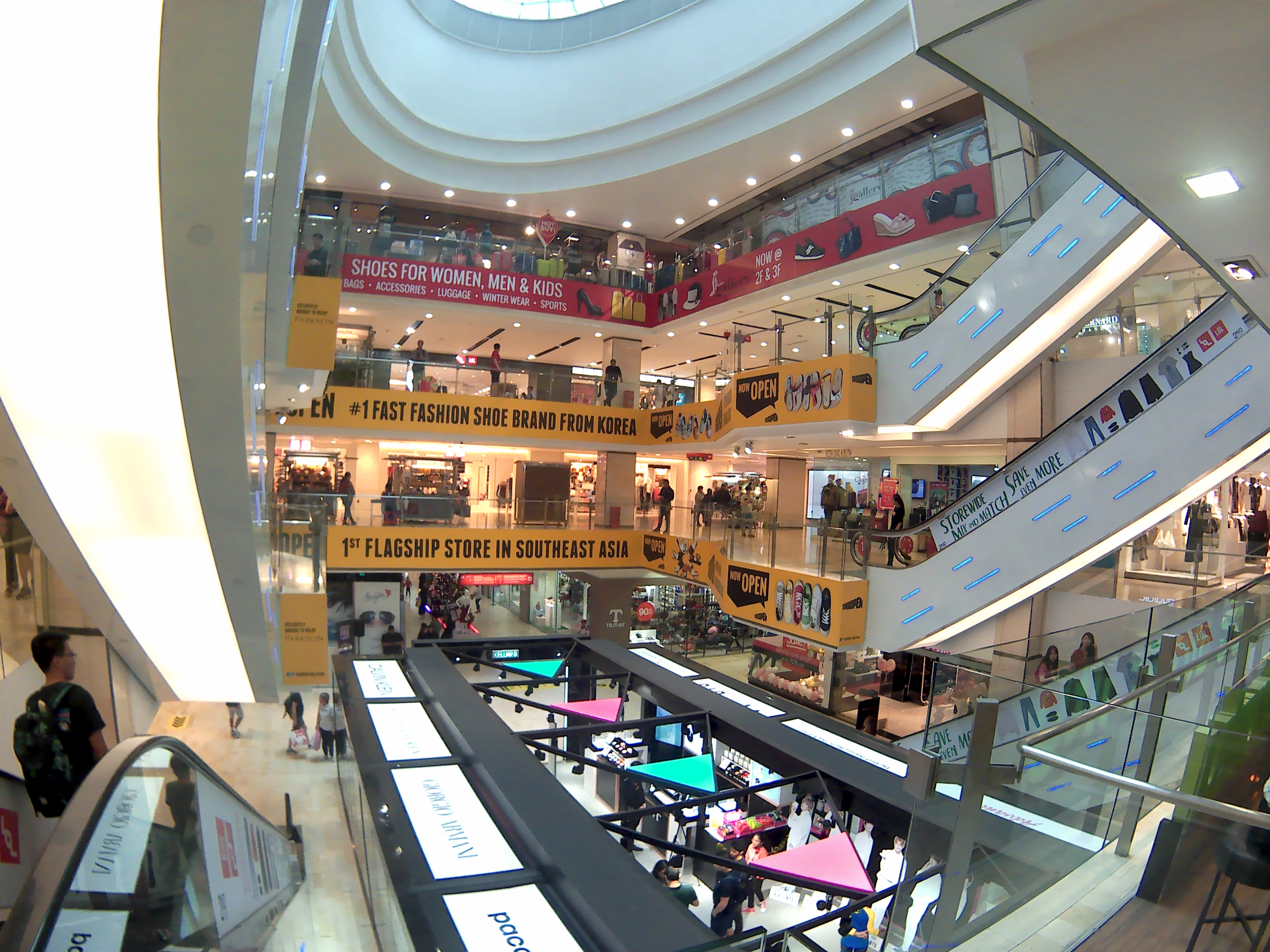 Fahrenheit 88 interior